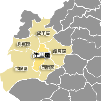 佳里區相對位置